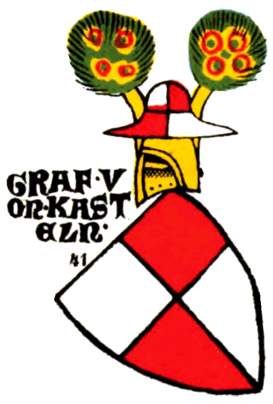 Wappen "Graf von Kasteln" (Castell)